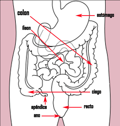 Modificado de la versión en blanco